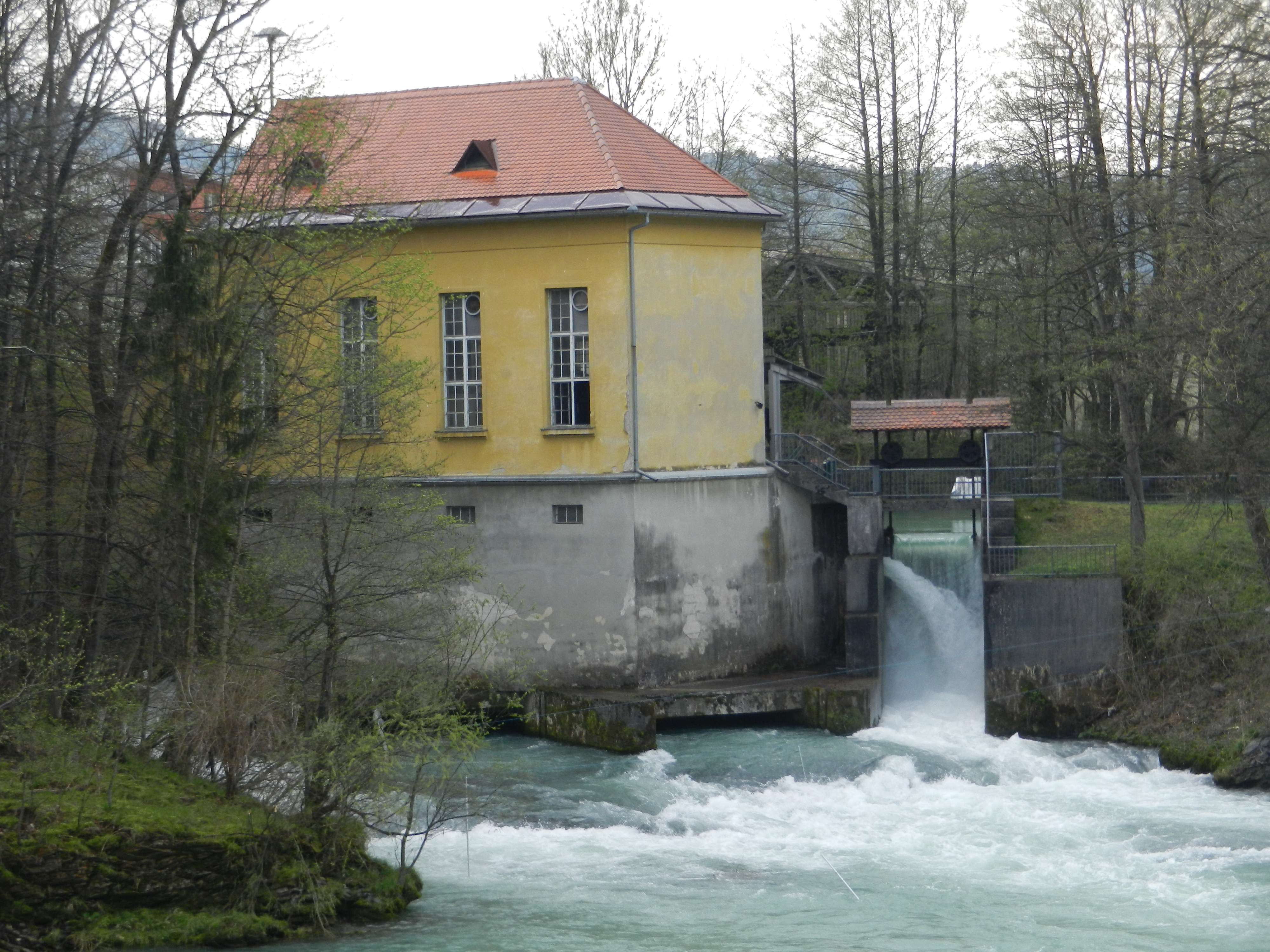 Hidroelektrarna Česenj na Savi v Ljubljani na Brodu